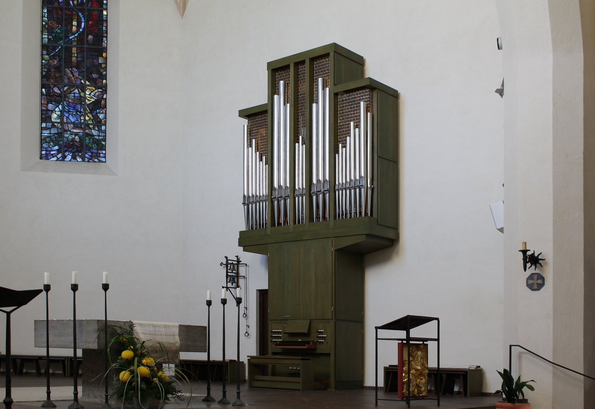 Chororgel von Leiden Christi in München (1998, Kaps, II/15)